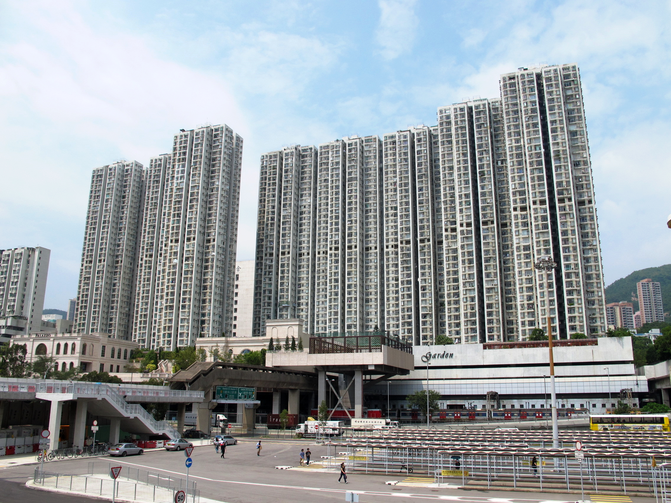 Jubilee Garden